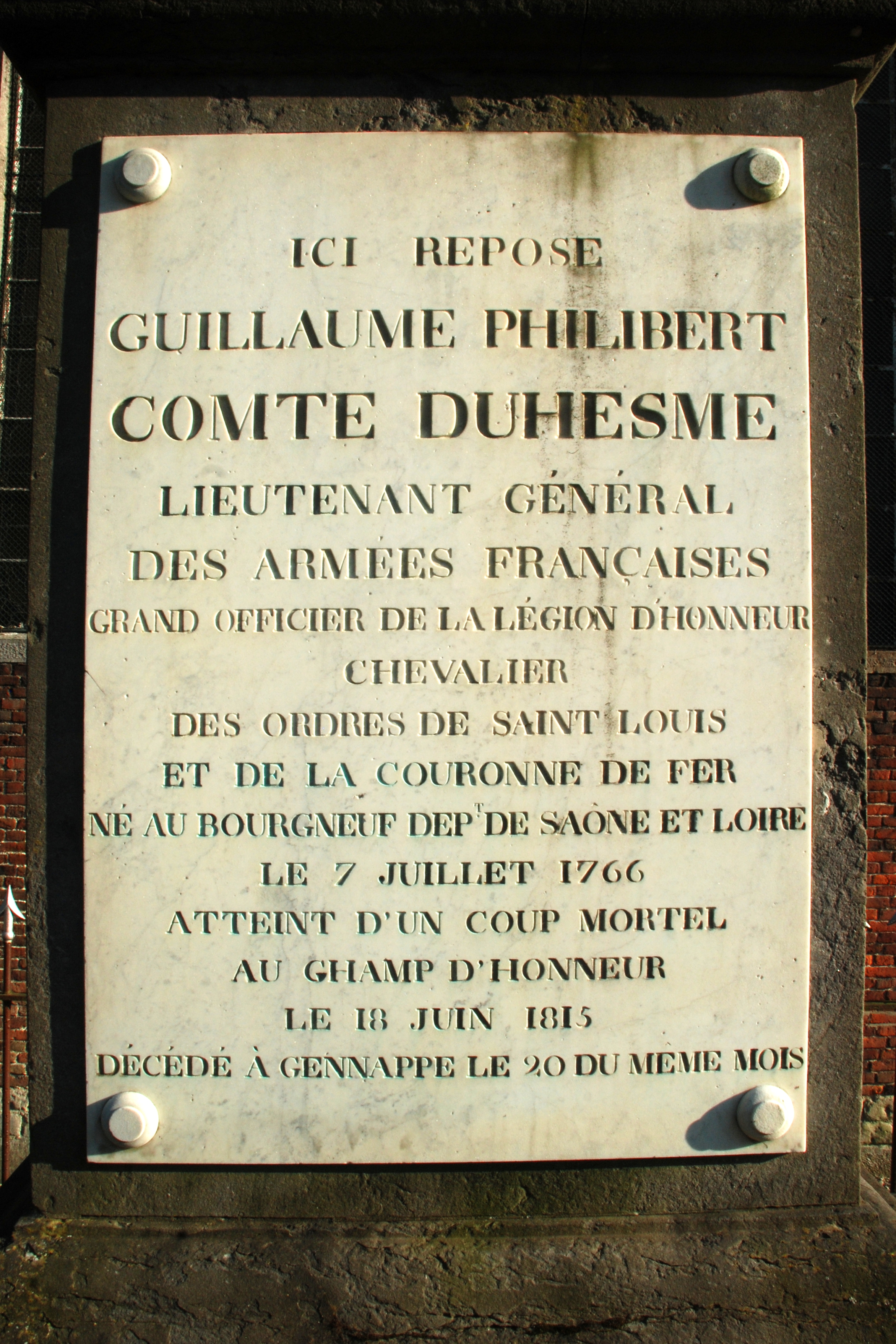 Belgique - Brabant wallon - Genappe - Ways - Mausolée Duhesme (tombe du Général Duhesme, mort des suites des blessures encourues à la bataille de Waterloo)